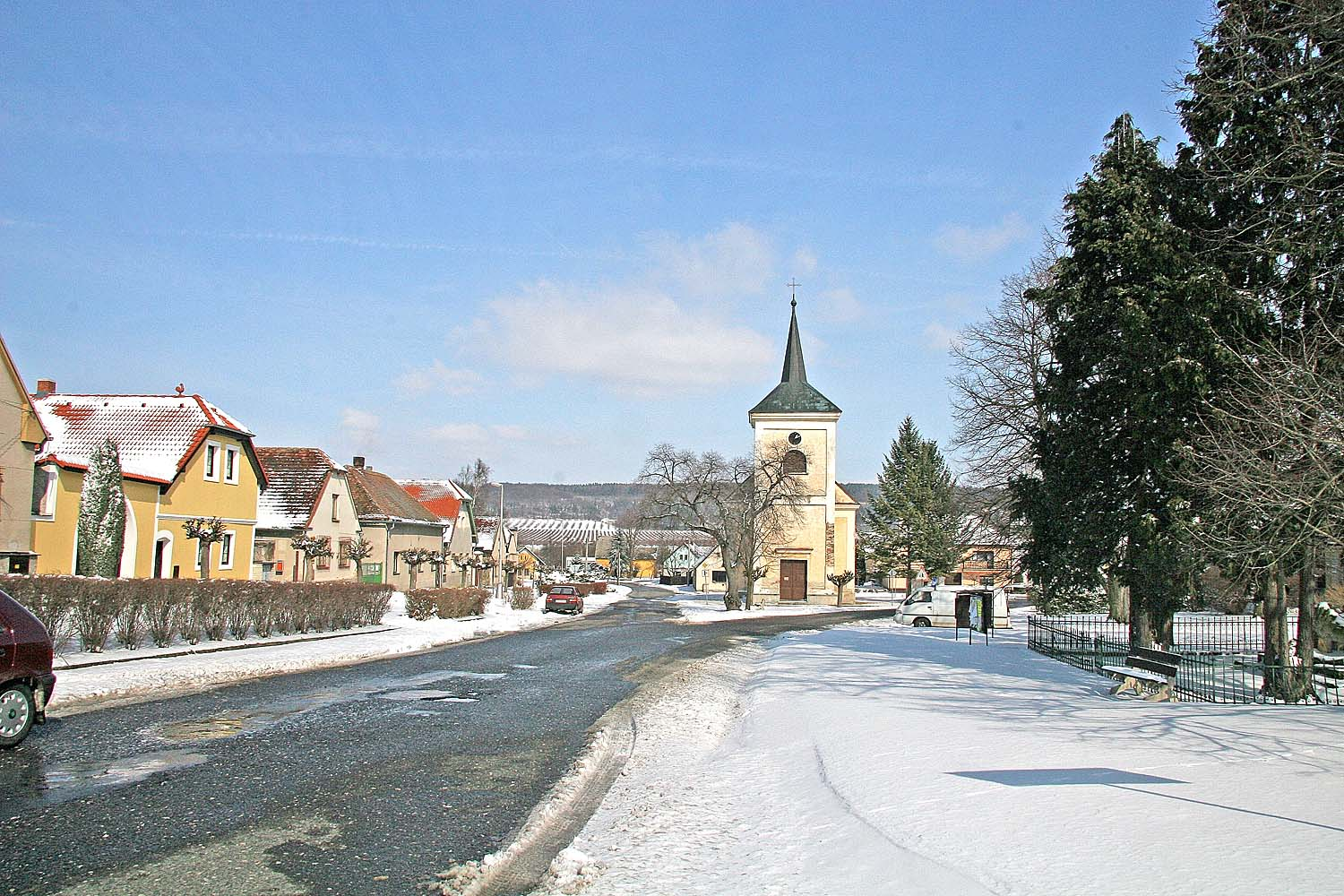 Náves v obci Bílé Podolí autor: Prazak date: 13. 3. 2006